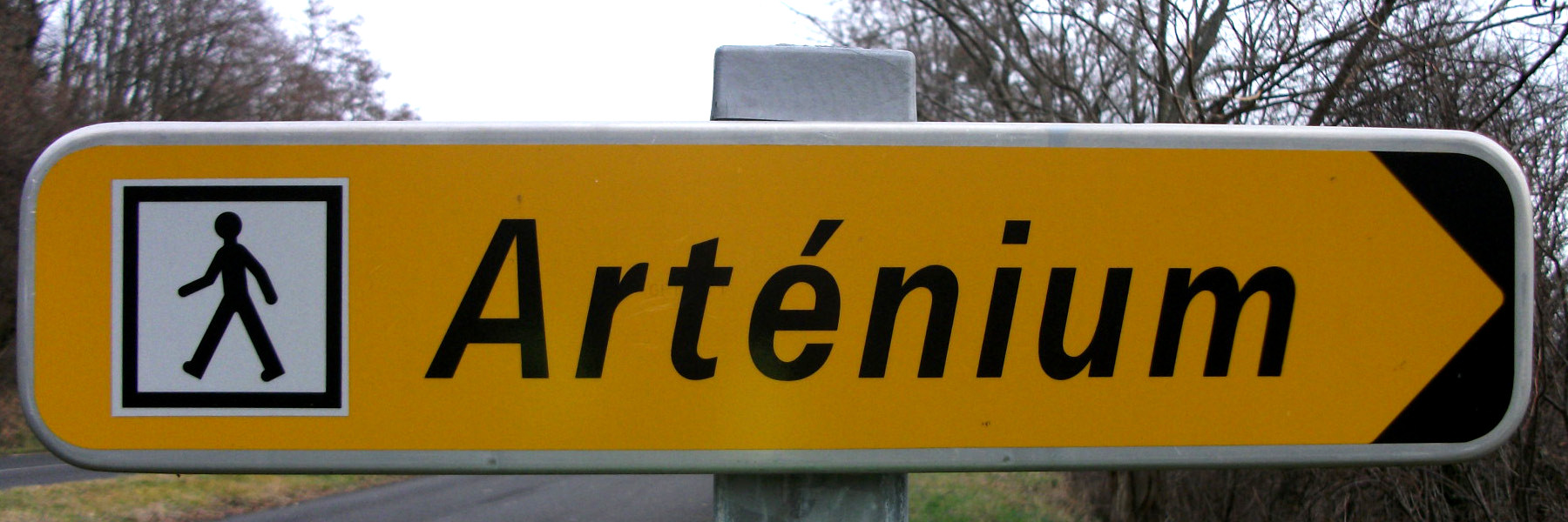 Panneau de signalisation de type D29 indiquant l'Arténium à Ceyrat (63). Placé au-dessus d'une poubelle située sur un délaissé de la RN 89.Le panneau utilise l'idéogramme ID34a créé par l'arrêté du 6 décembre 2011 (JO du 22) et est à fond jaune, Signaux Girod Auvergne 2011